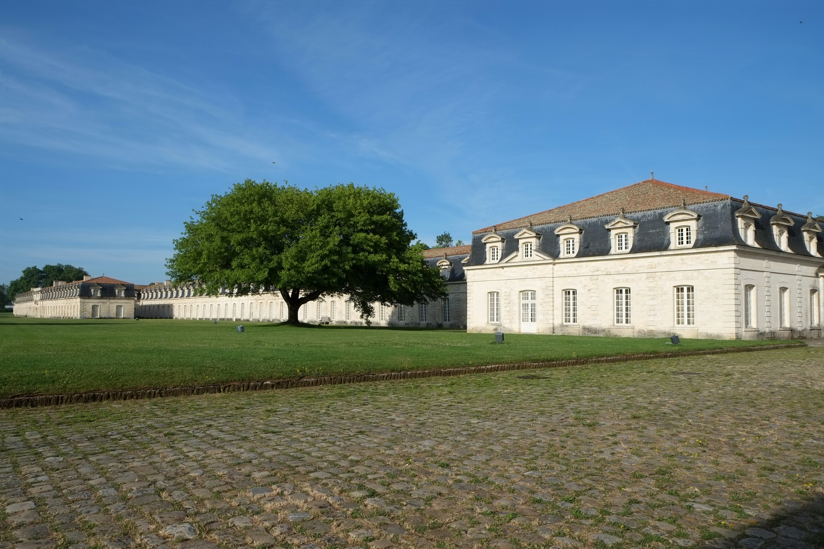 La Corderie Royale Rochefort Charente-Maritime France .